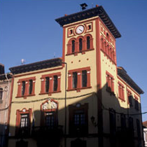 Imagen del ayuntamiento de Grado (Asturias)